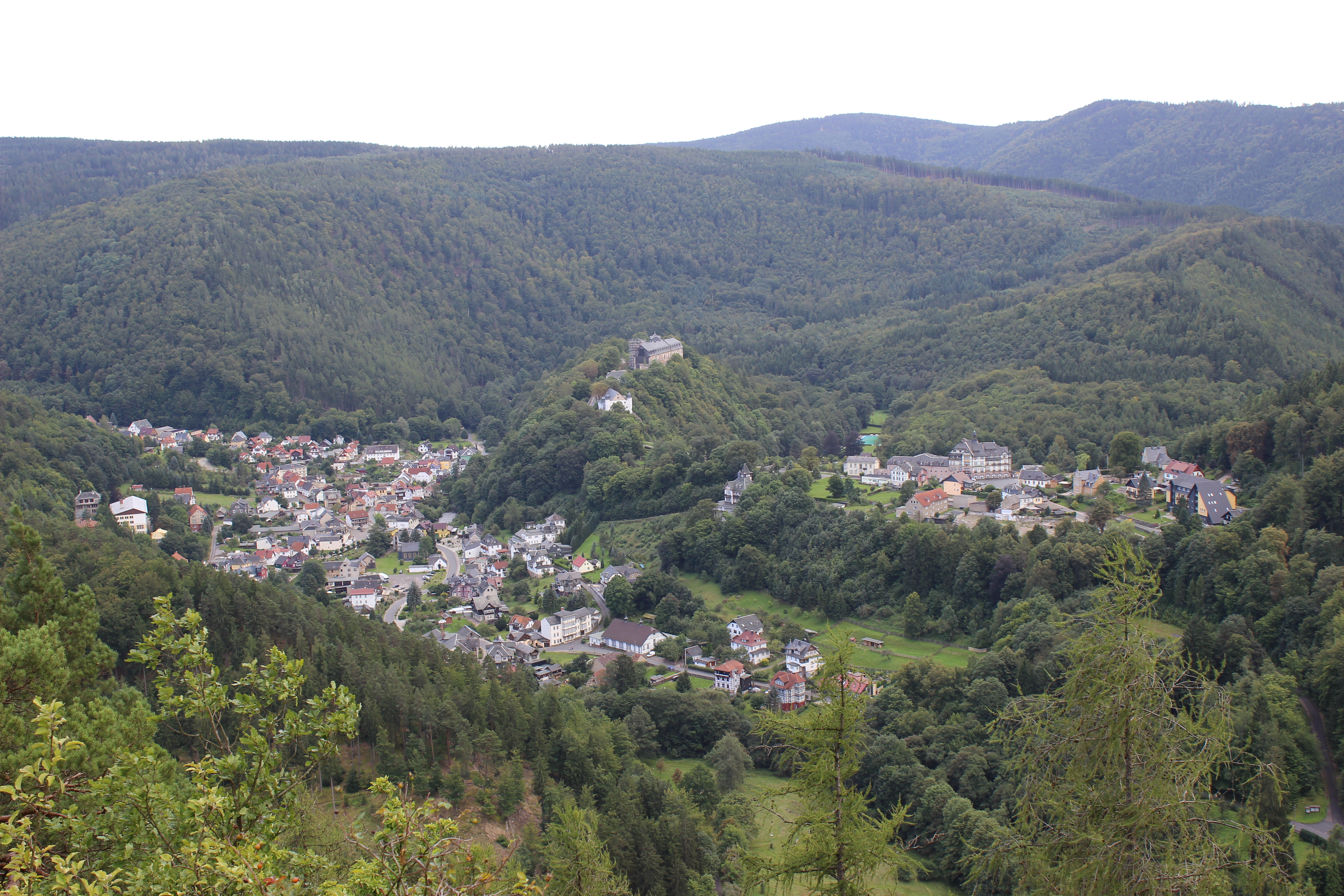 Blick vom Trippstein auf Schwarzburg; weitere Bereiche im Landschaftsschutzgebiet „Thüringer Wald“